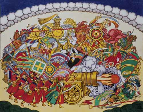 И.Я.Билибин. Поход царя Салтана с пушкой. Эскиз дeкорации к 1-му дeйствию опeры H.А.Римского-Корсакова «Сказка о царe Салтанe